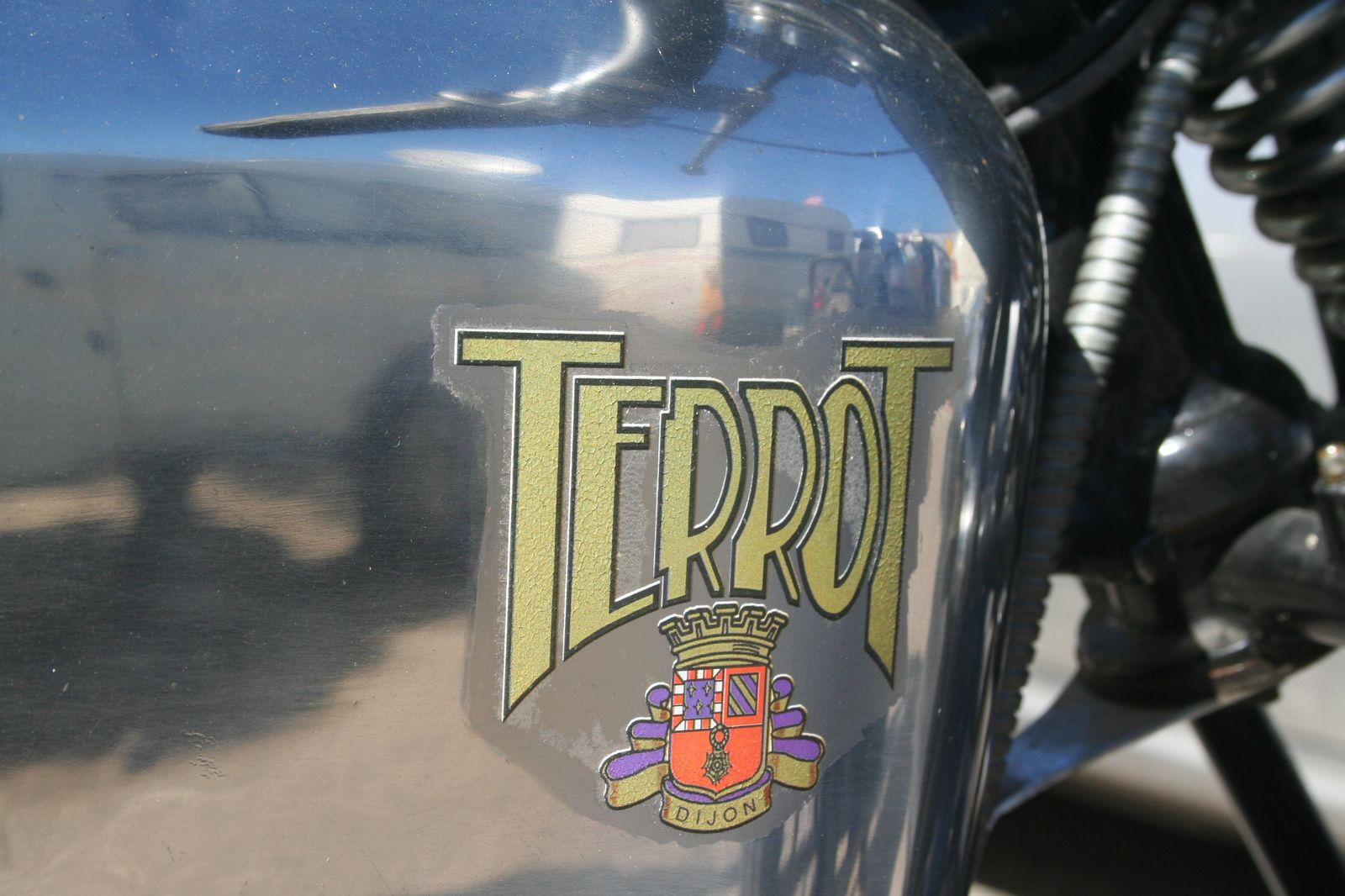 terrot